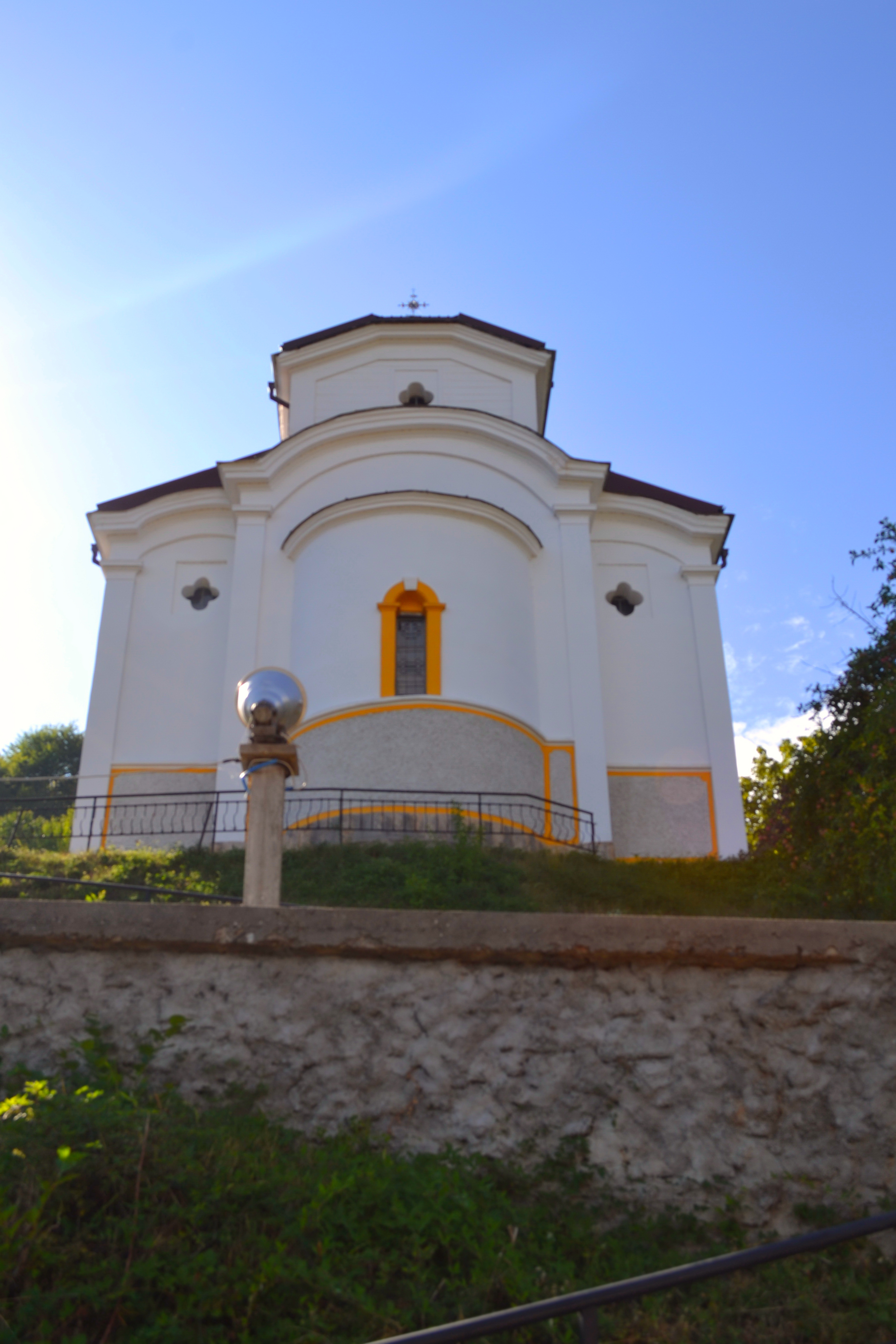 Специфична македонска архитектура - Црквата Свети Петар и Павле во село Папрадиште. Ова е фотографија на споменик на културата во Македонија со типски код: Ова е фотографија на споменик на културата во Македонија со типски код: A01This is a a photo of a cultural monument in North Macedonia with type id: A01 This is a a photo of a cultural monument in North Macedonia with type id: Ова е фотографија на споменик на културата во Македонија со типски код: A01This is a a photo of a cultural monument in North Macedonia with type id: A01